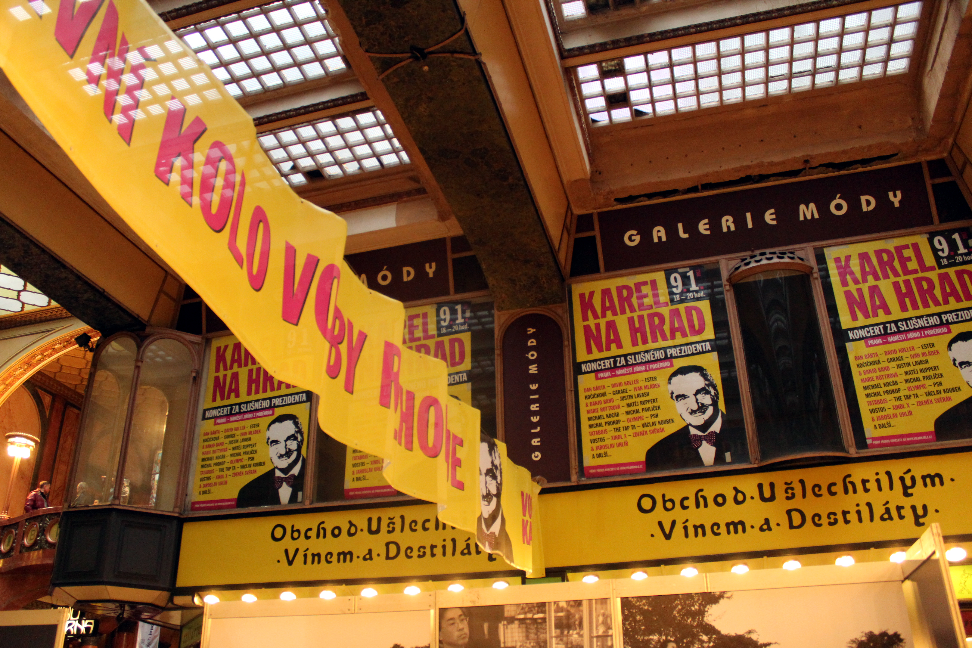 Setkání příznivců Karla Schwarzenberga v závěrečný den voleb. Palác Lucerna.